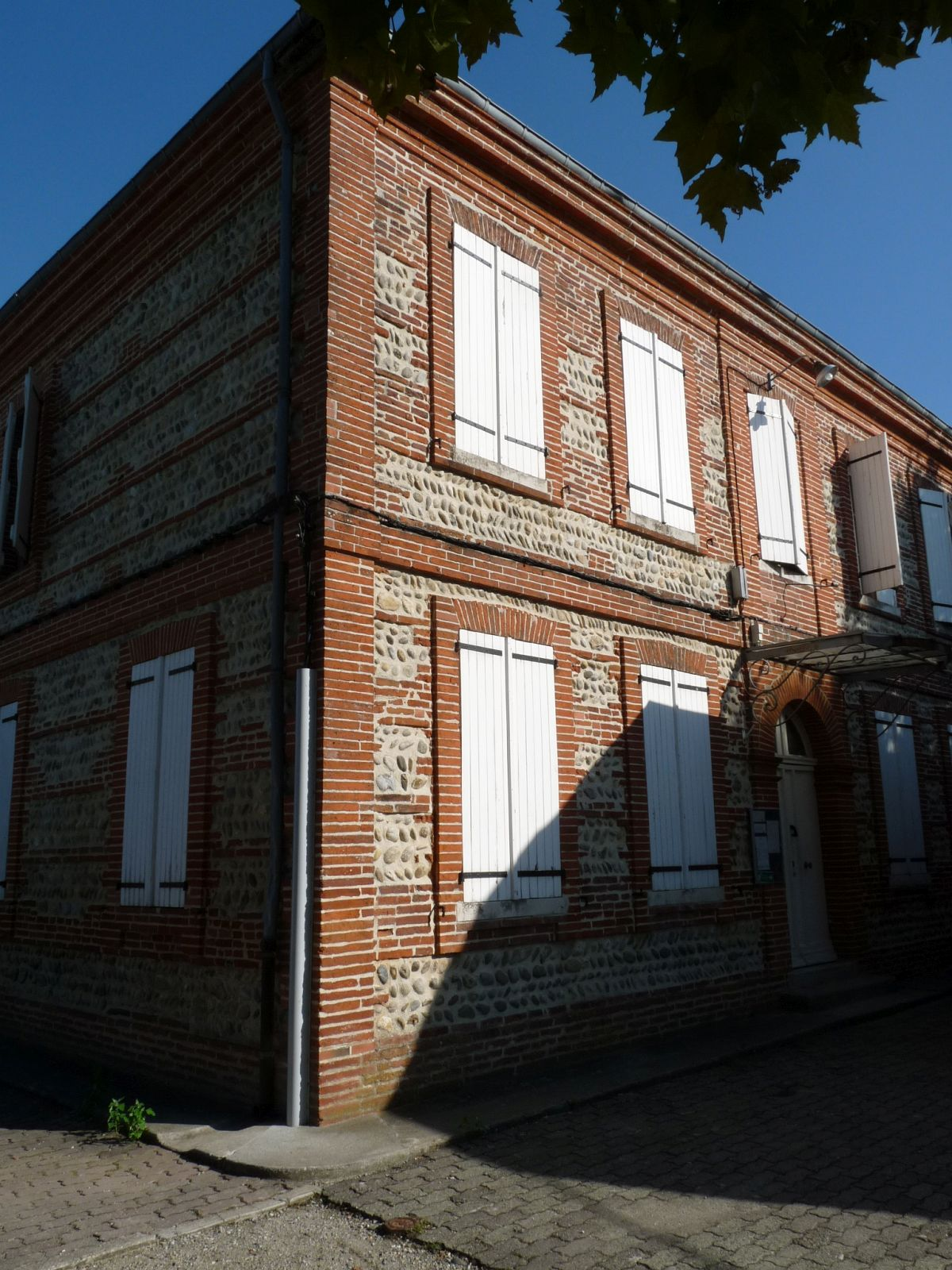 Mairie d'Issus, Haute-Garonne, France